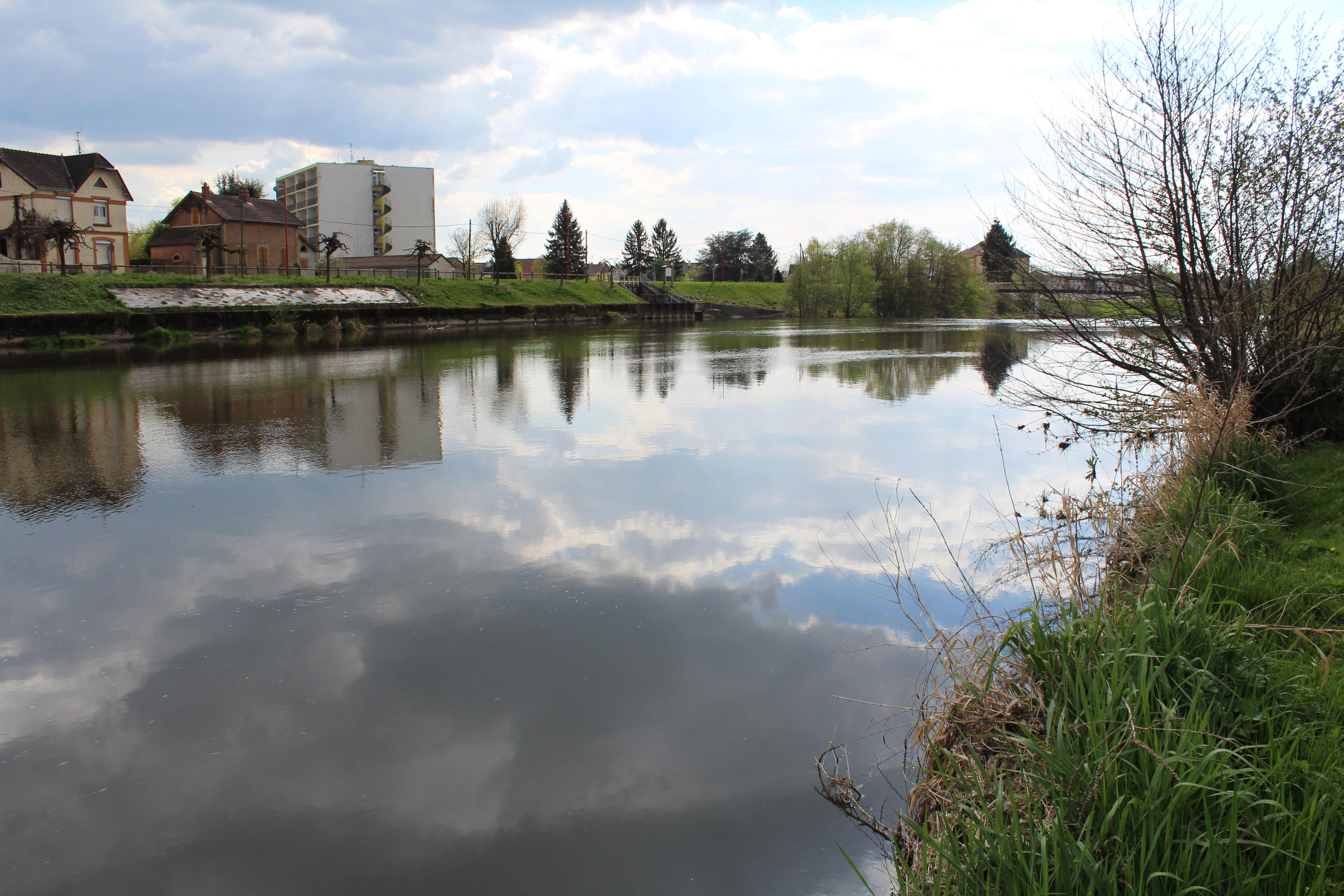 L'Arroux à Gueugnon.